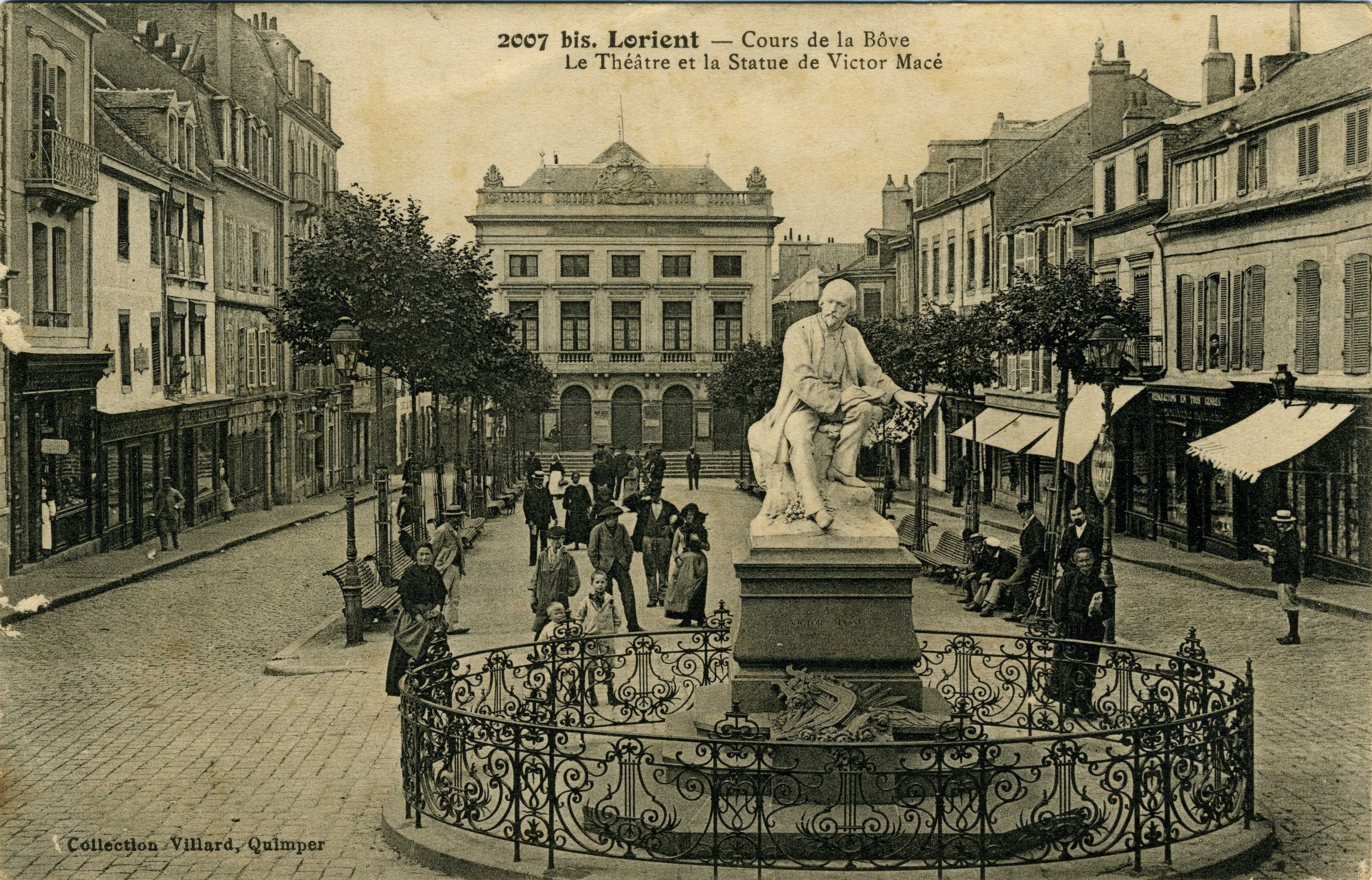 Le cours de la Bôve, le théâtre et la statue de Victor Macé à Lorient dans le département du Morbihan, France. 1907.